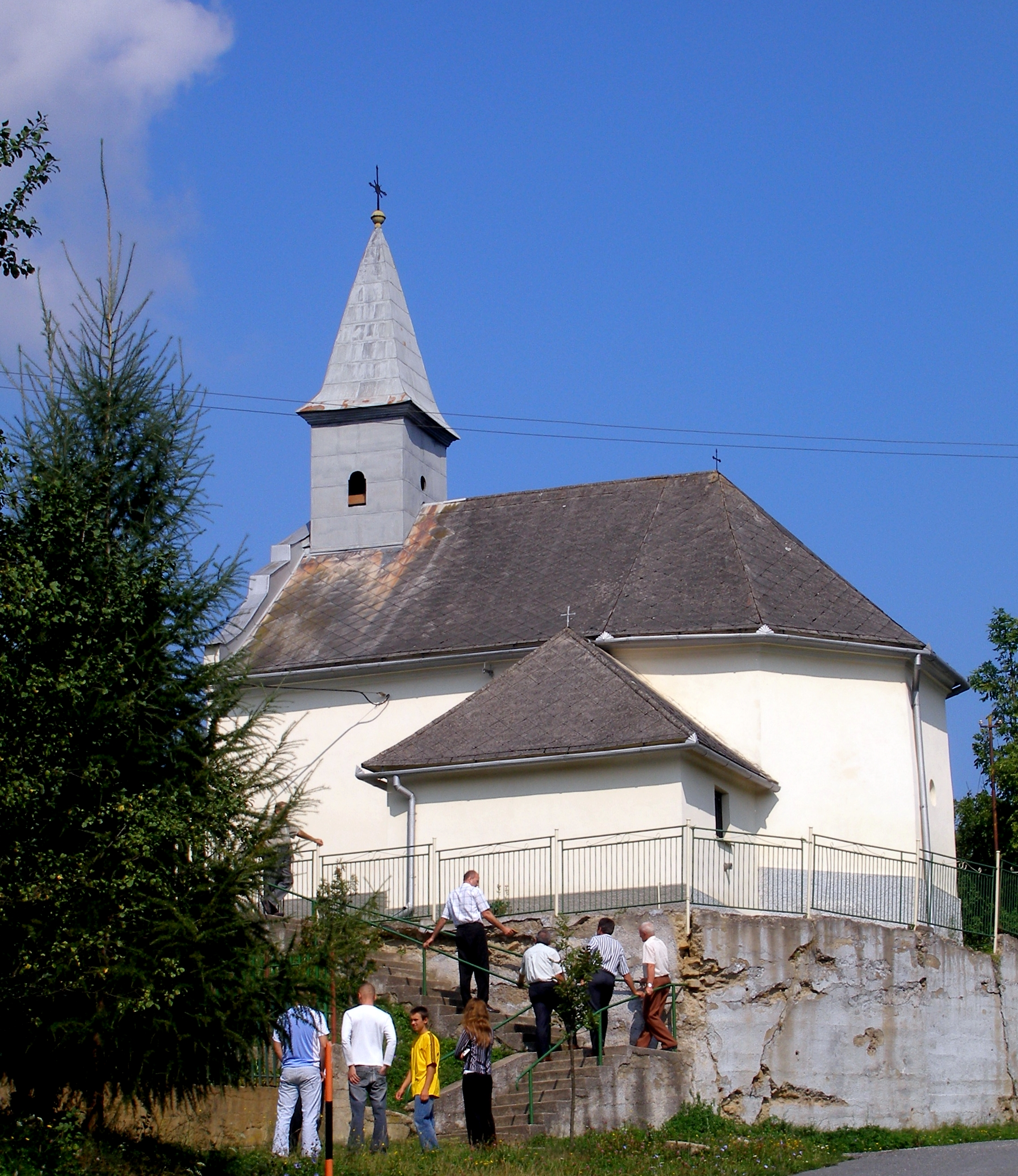 Šarišská obec Daletice